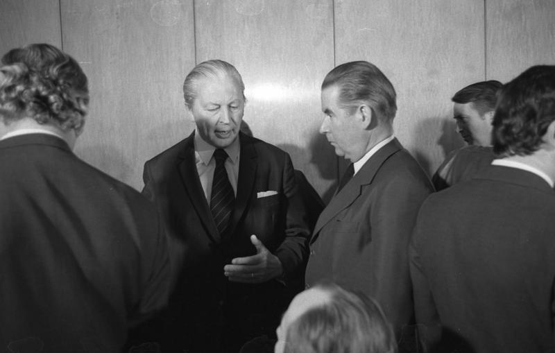 Als neuer Vorsitzender der CDU/CSU-Bundestagsfraktion wird Prof. Dr. Karl Carstens von K. G. Kiesinger vor dem CDU-Fraktionssaal des Bundestages vorgestellt. (Mitte: Kiesinger)